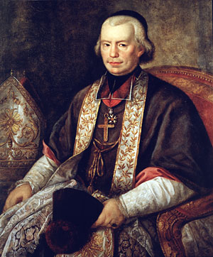 Joseph Ludwig Colmar, der erste Mainzer Bischof nach dem Konkordat von 1801 und der Säkularisation des Kurstaates 1803.